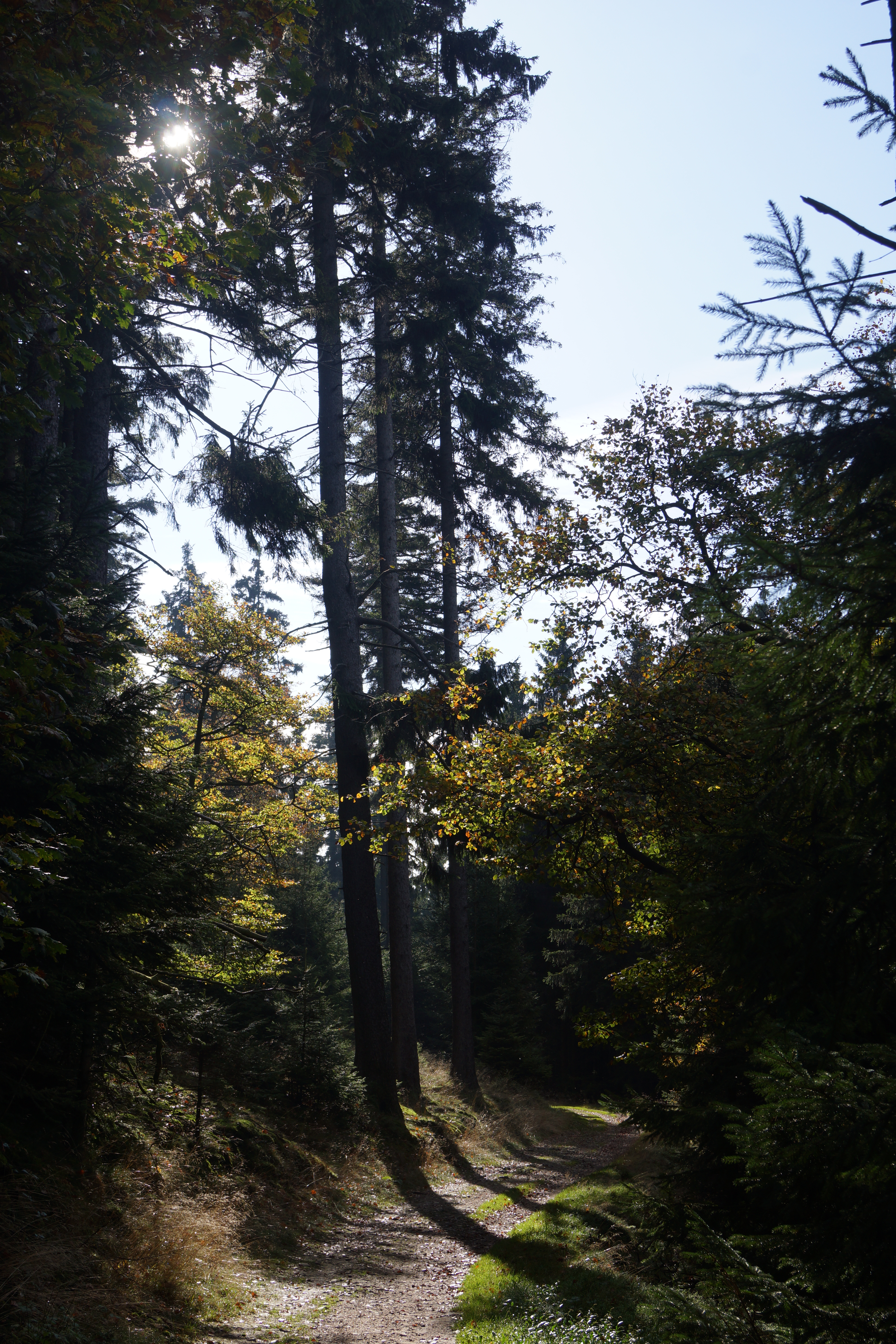 Herbststimmung im Hochtaunus am Nordwesthang des Klingenkopfes Richtung Südwest.